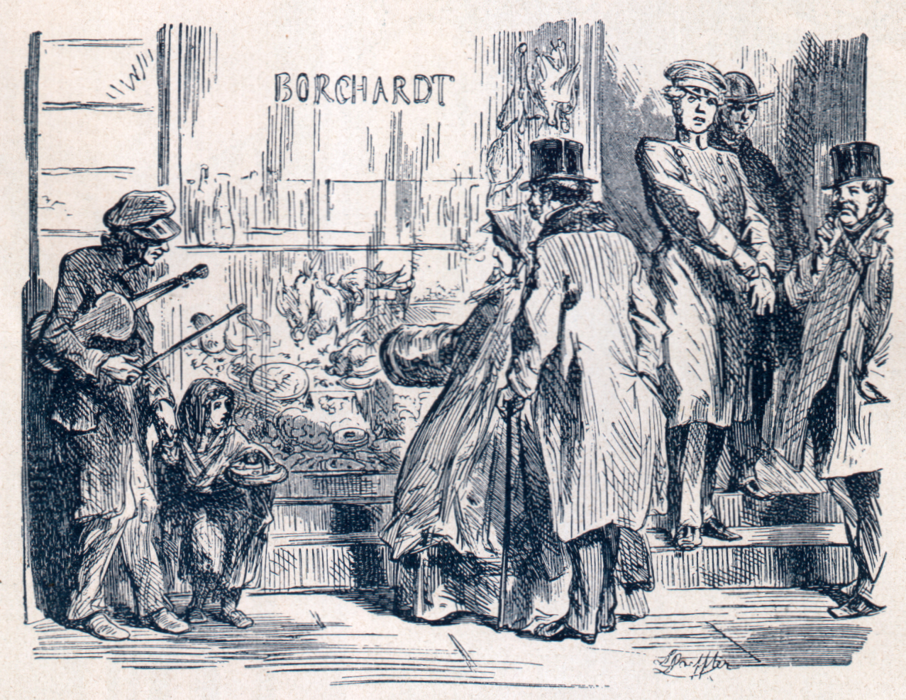 Rudolph Hertzog, Agenda 1914. Jahreskalender des Berliner Kaufhauses. Vor Borchardt's Schaufenster.